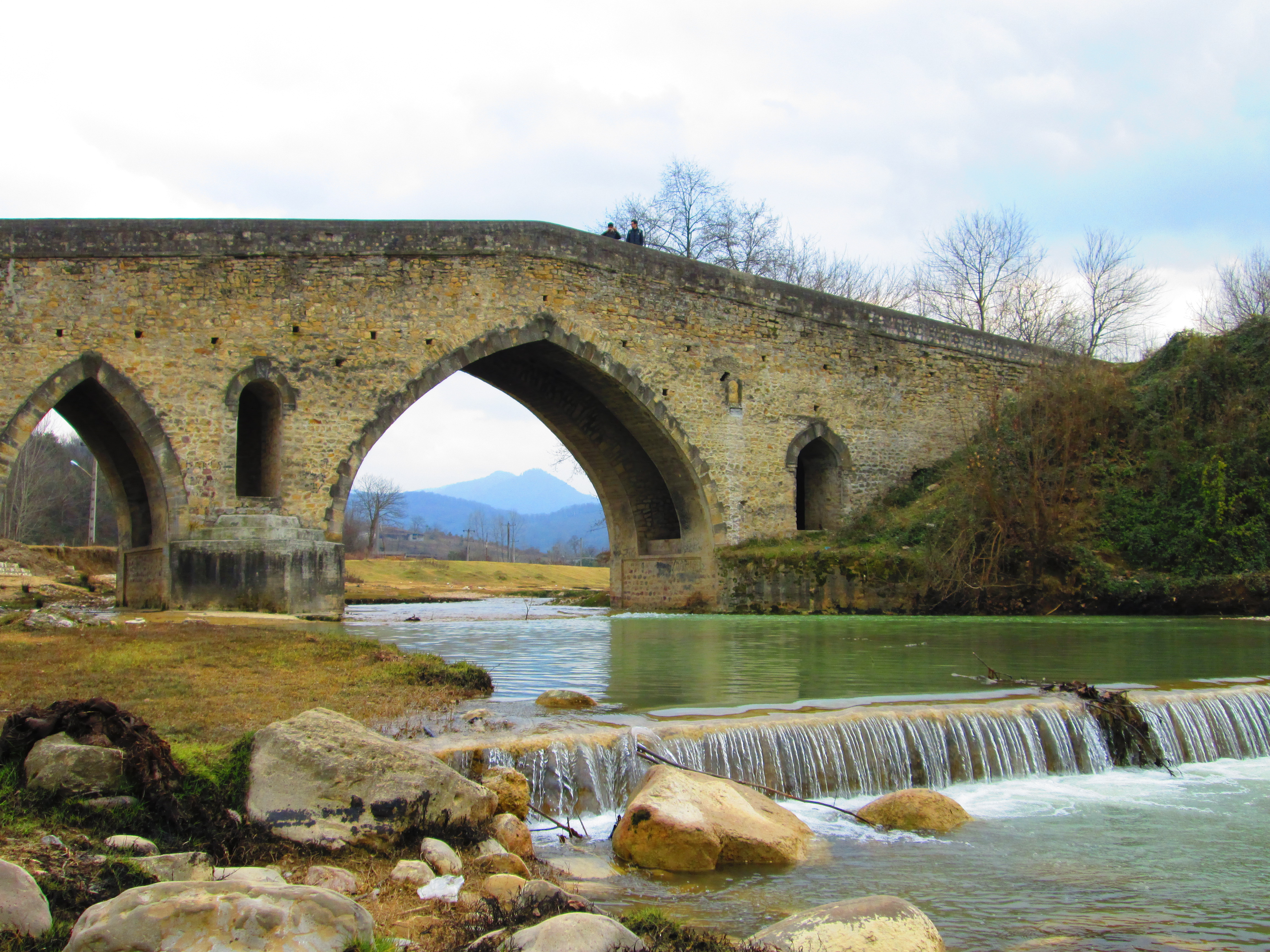 پل شاپور شیرگاه